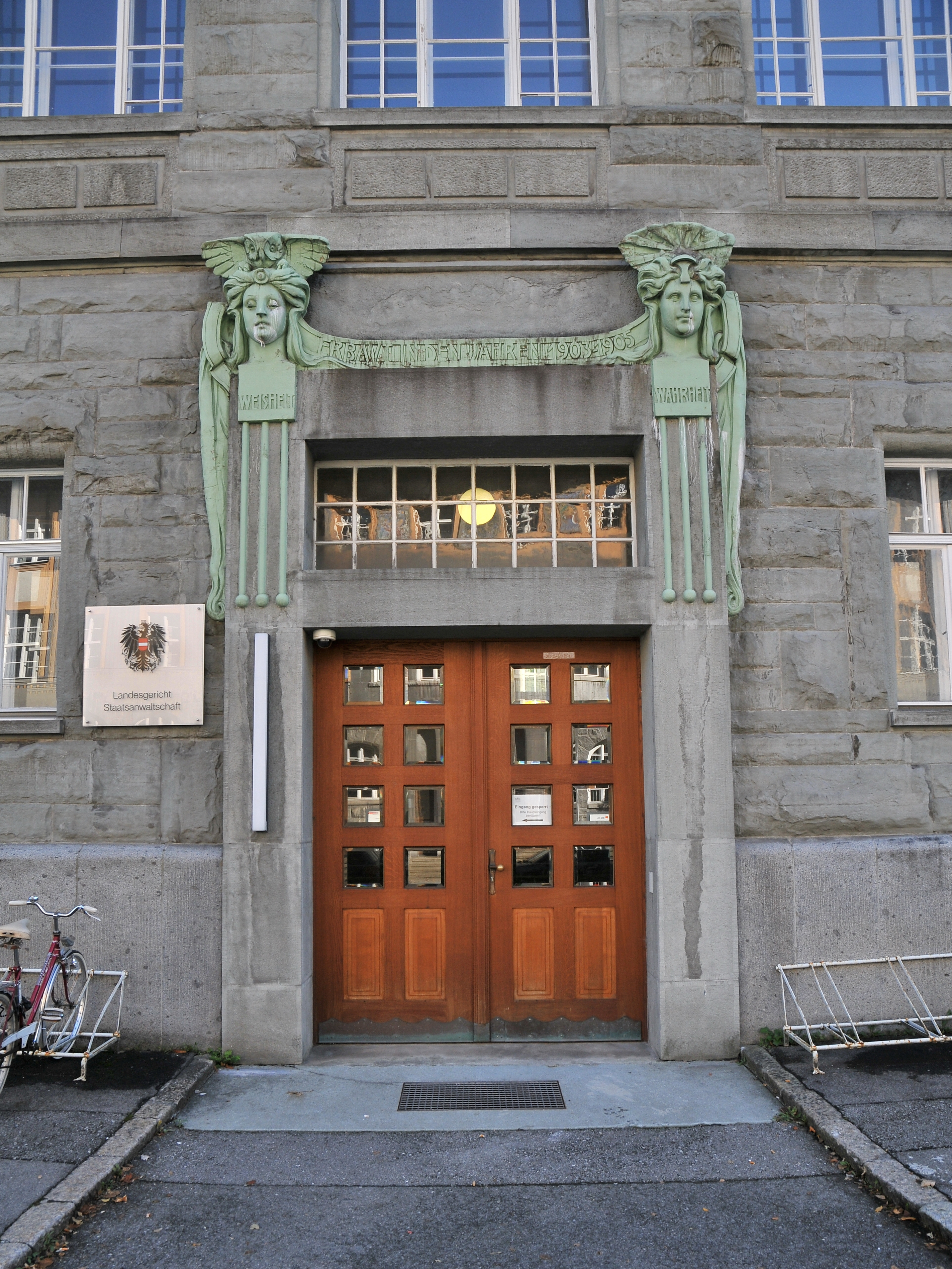 Landesgericht für Vorarlberg, Schillerstrasse 1 in Feldkirch. Architekt: Ernst Dittrich Baujahr 1903/05 Jugendstil - Strassenseite Schillerstrasse